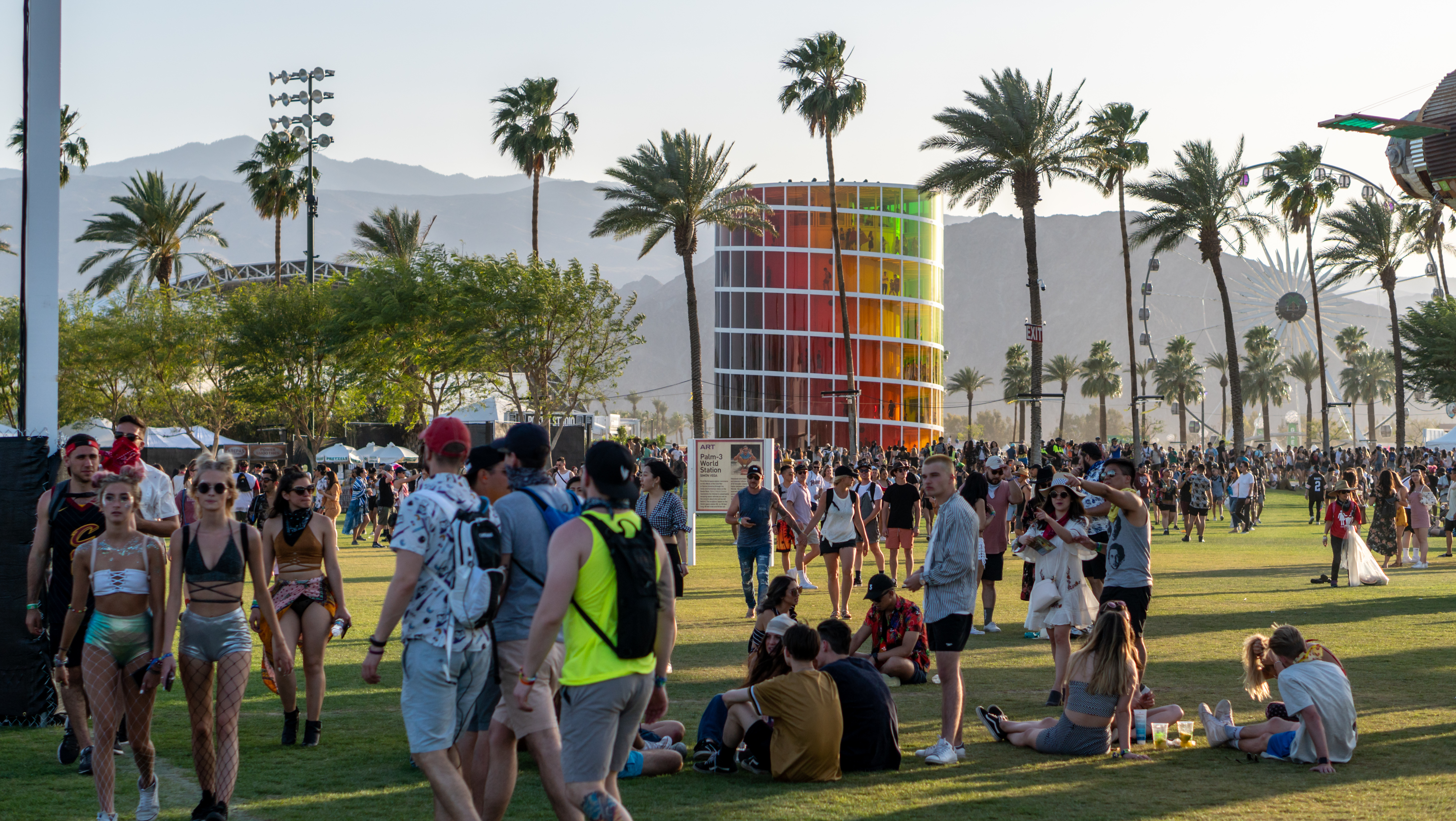 Coachella18W1-18